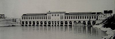 L'usine hydro-électrique de Cusset en 1902 (canal de Jonage).